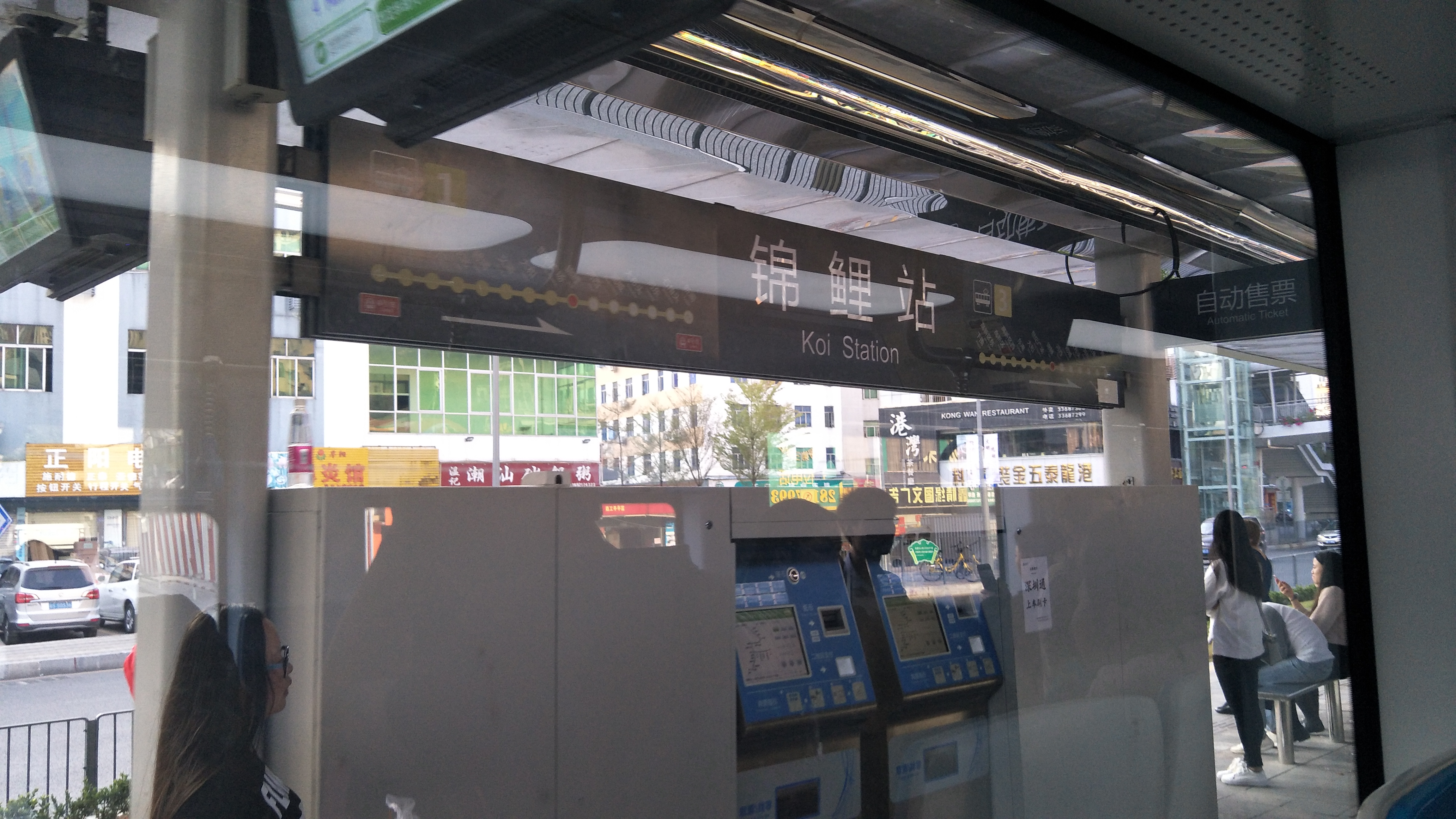 深圳有轨电车锦鲤站站名牌，位于龙华区